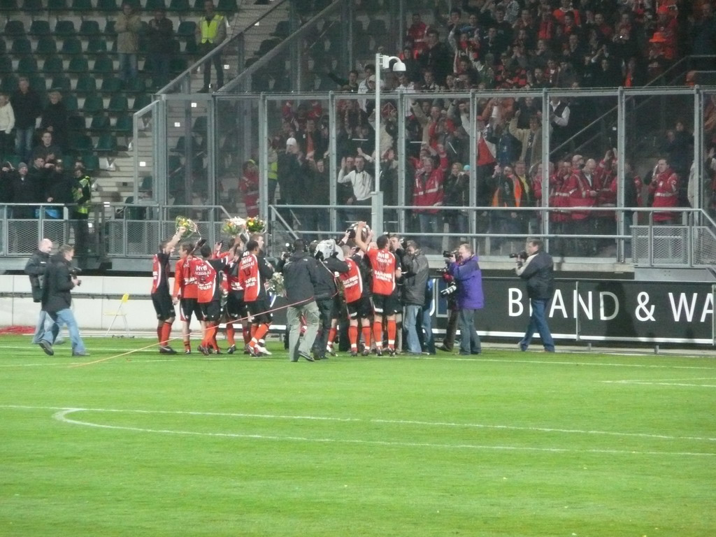 Kampioen van de Eerste divisie 2007-2008, dus rechtstreekse promotie naar de Eredivisie.